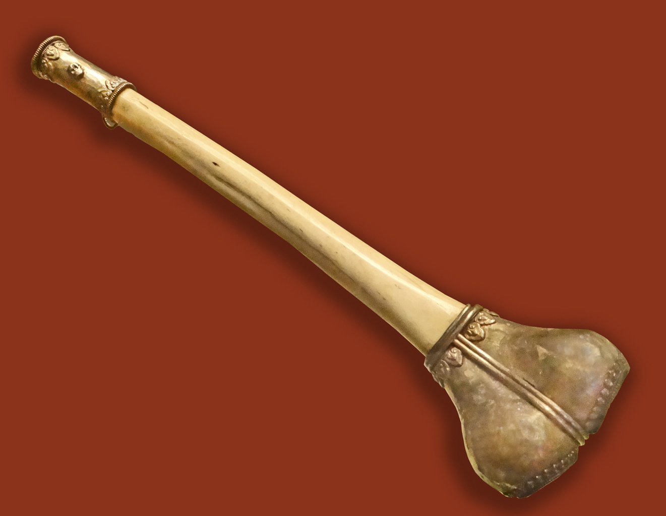 Kangling (Thigh bone) Cette petite trompe en os humain (fémur) et en argent est utilisée par les moines bouddhistes tibétains dans les rituels, d'origine shamanique, pour chasser les démons Tibet XIXè siècle Sir Charles Bell Article de Wikipedia British Museum (Londres) Catalogue du musée